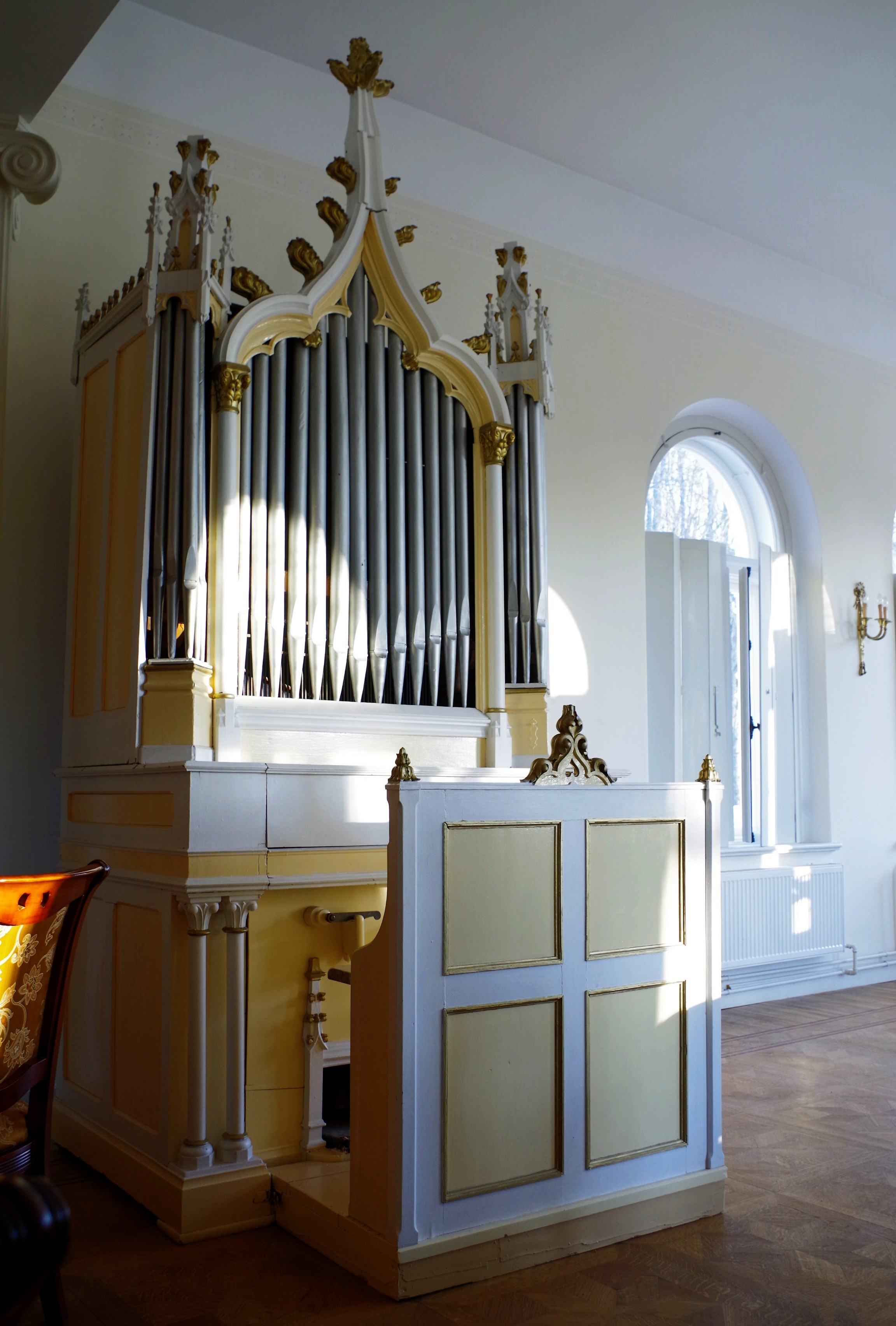 Puurmani mõisa peahoone